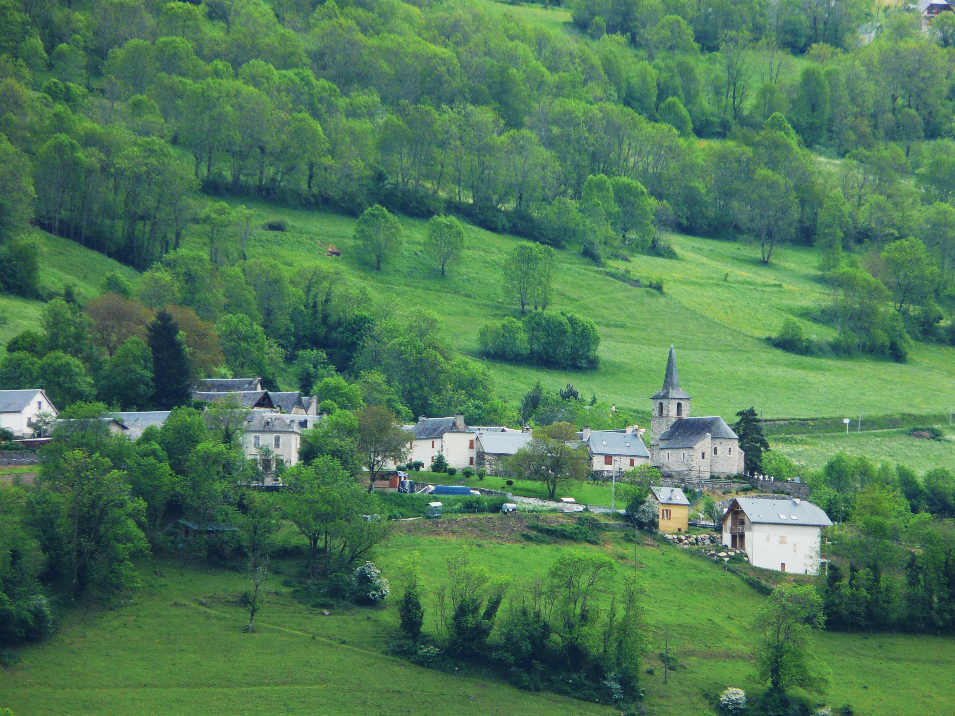 Le village d'Estensan, Hautes-Pyrénées, France.